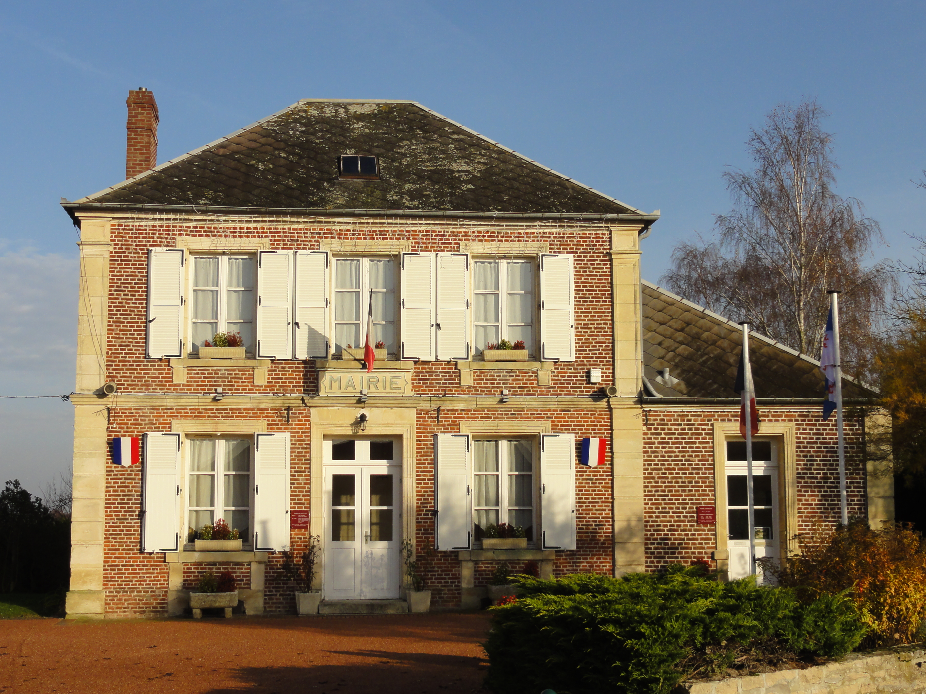 La mairie.